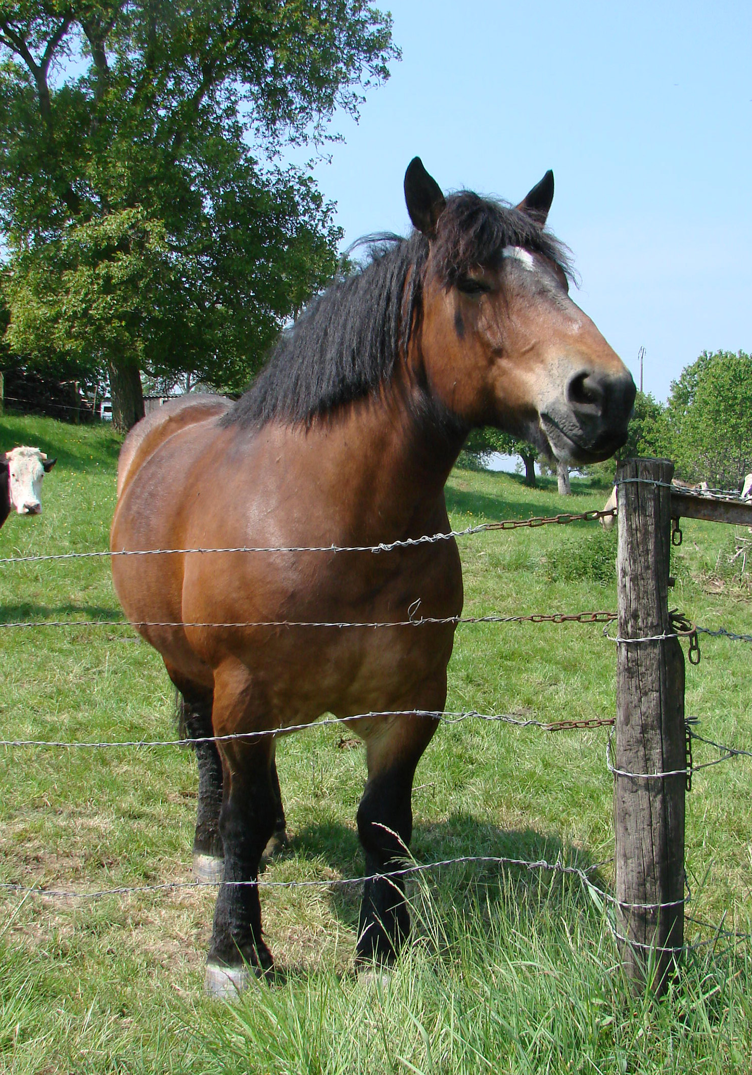 Cheval de race ardennaise.